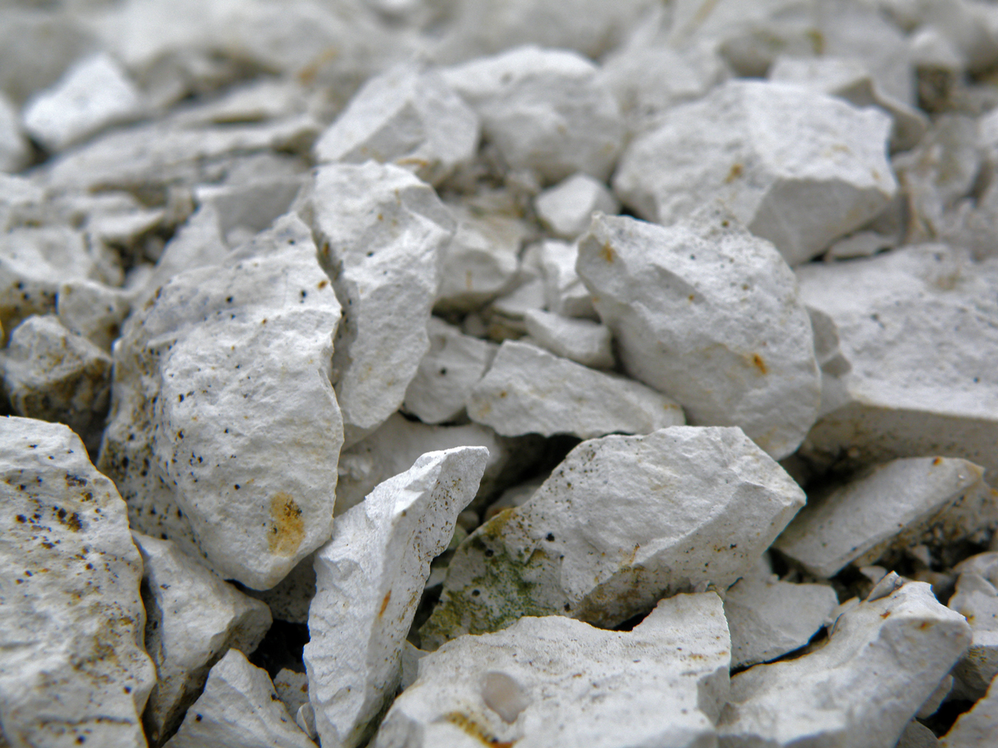 Chełm, Cementownia CHEŁM S.A. - kreda